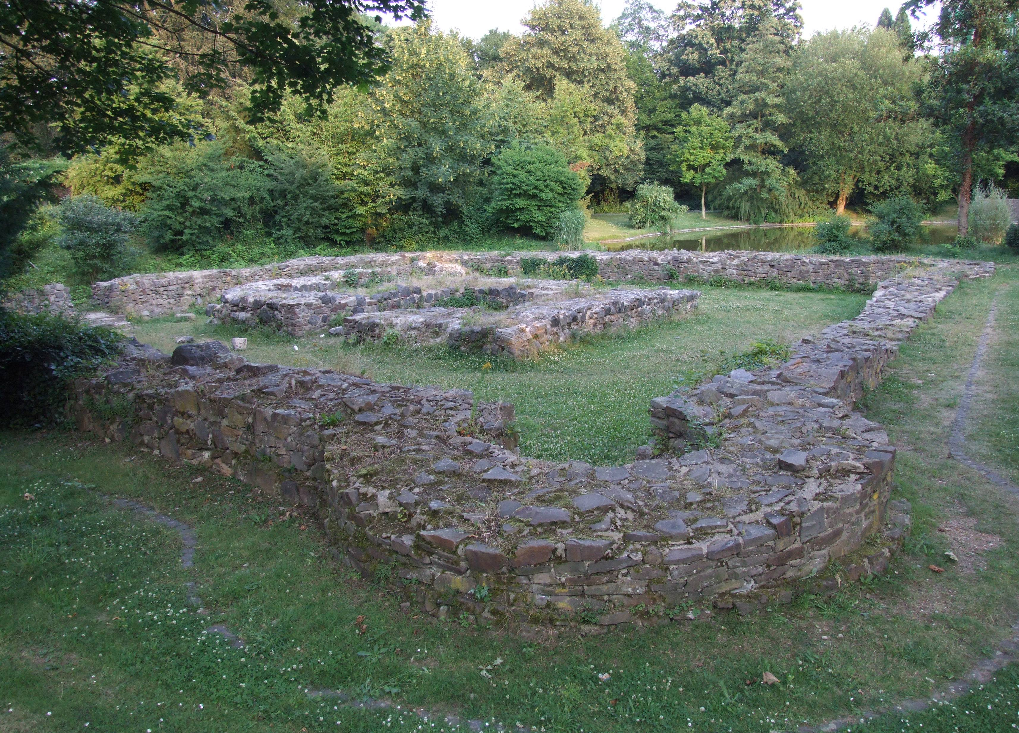 Fundament von Burg Reitersdorf in Bad Honnef